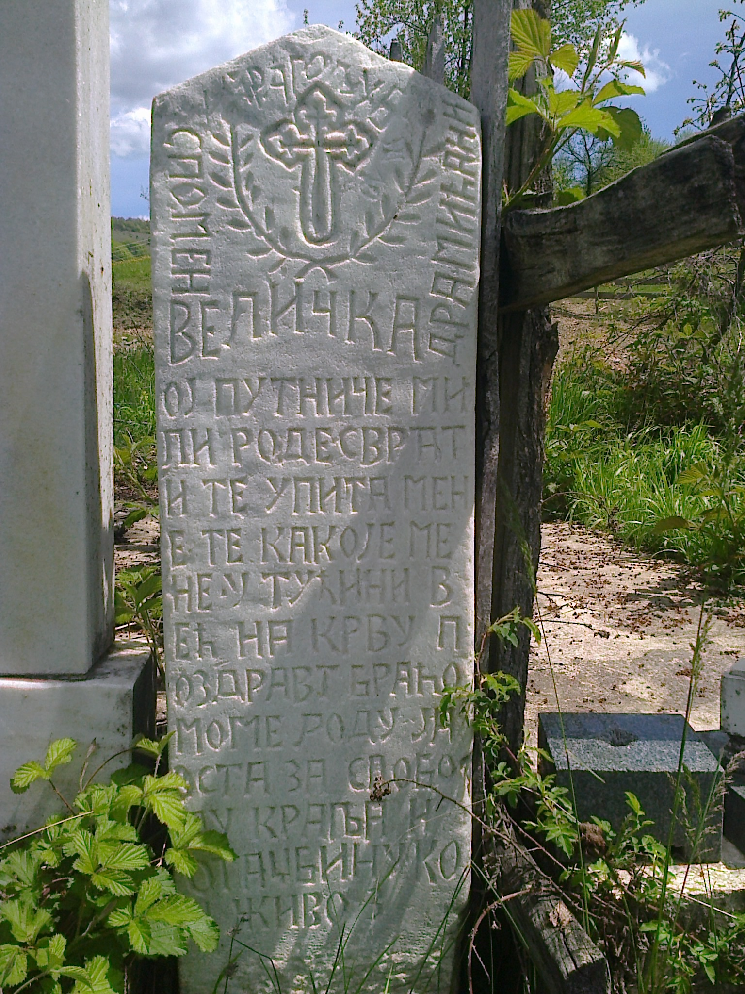 Српски (ћирилица): Крајпуташ